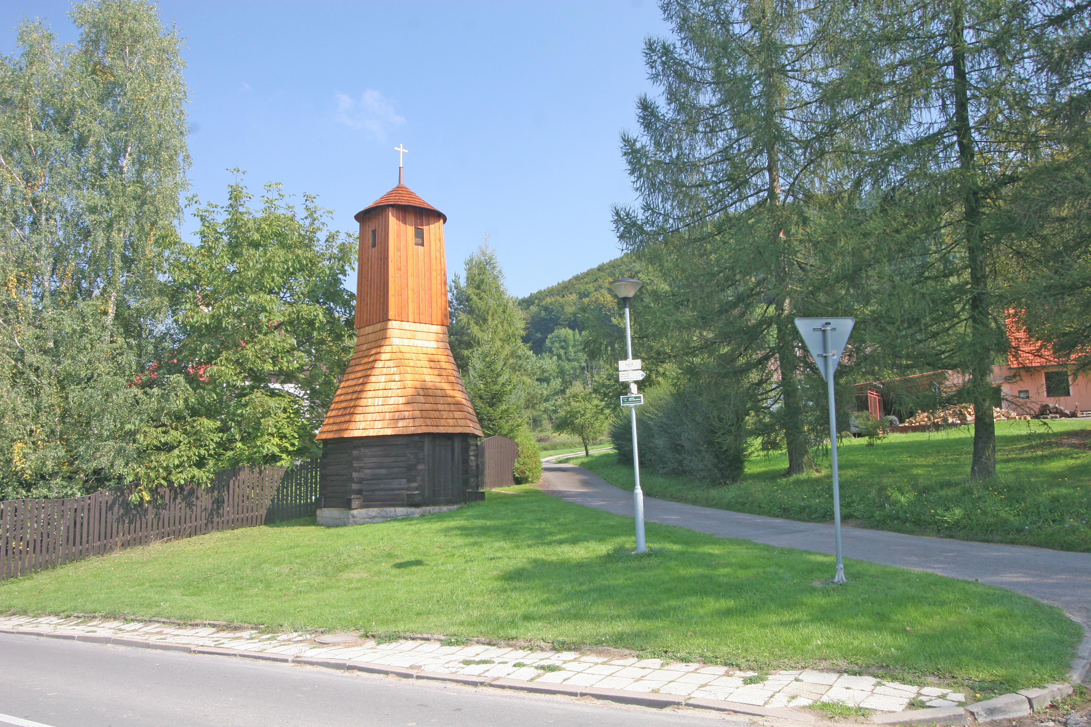 Zvonice, u domu čp. 13, Rviště.